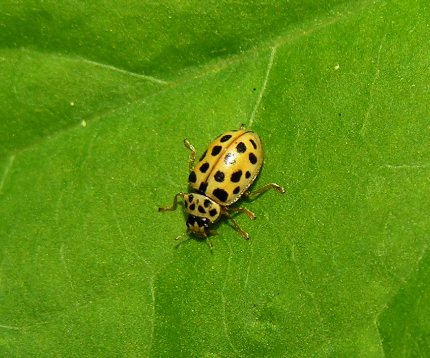 Devyniolikataškė boružė (Anisostica novemdecimpunctata) Šeima. Boružės (Coccinellidae) Foto: Algirdas, 2006 m. birželio 25 d., Lietuva